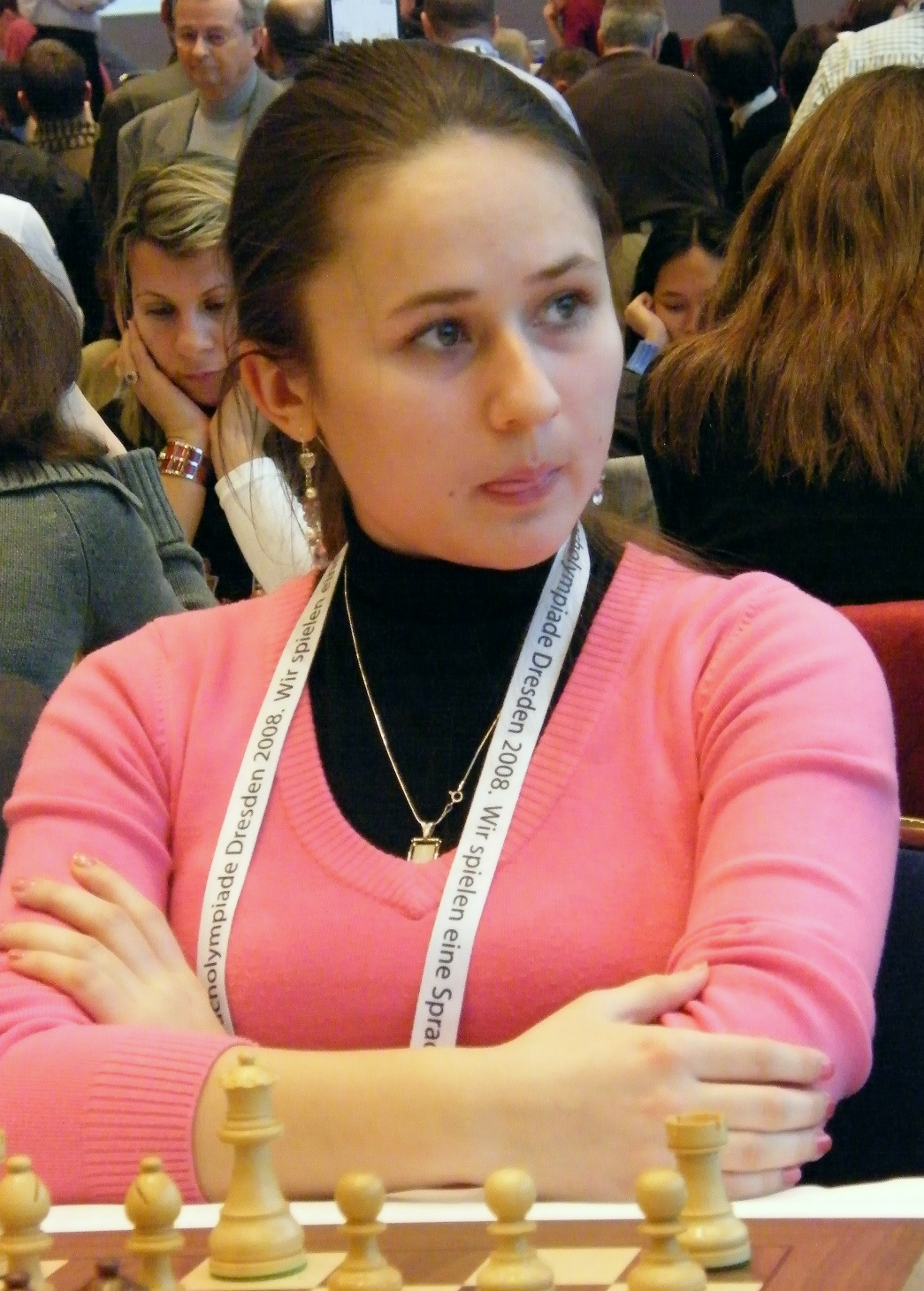 Deimante Daulyte bei der 38. Schacholympiade in Dresden 2008